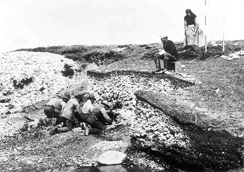 Udgravning i 1890`erne af Ertebølle-køkkenmøddingen v. Limfjorden som gav navn til kulturperioden. Foto: National- museet